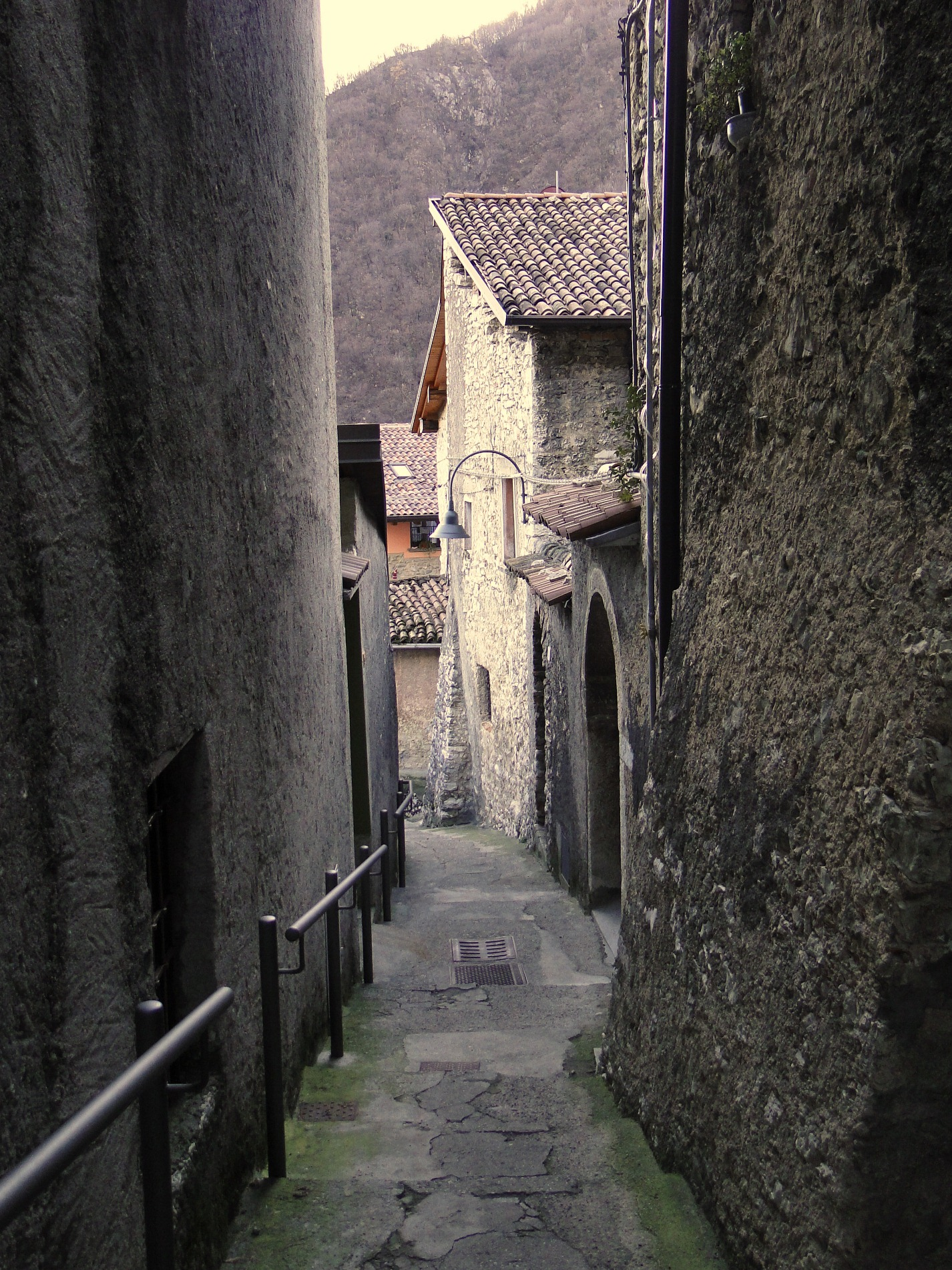 Scorcio di Olera, fraz. di Alzano Lombardo (BG), Italy.